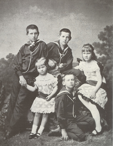 Filhos mais velhos do rei Jorge I da Grécia e da Grã-duquesa Olga Constantinovna da Rússia, o futuro rei Constantino I da Grécia, o Príncipe Jorge, a Princesa Alexandra, o Príncipe Nicolau e a Princesa Maria.